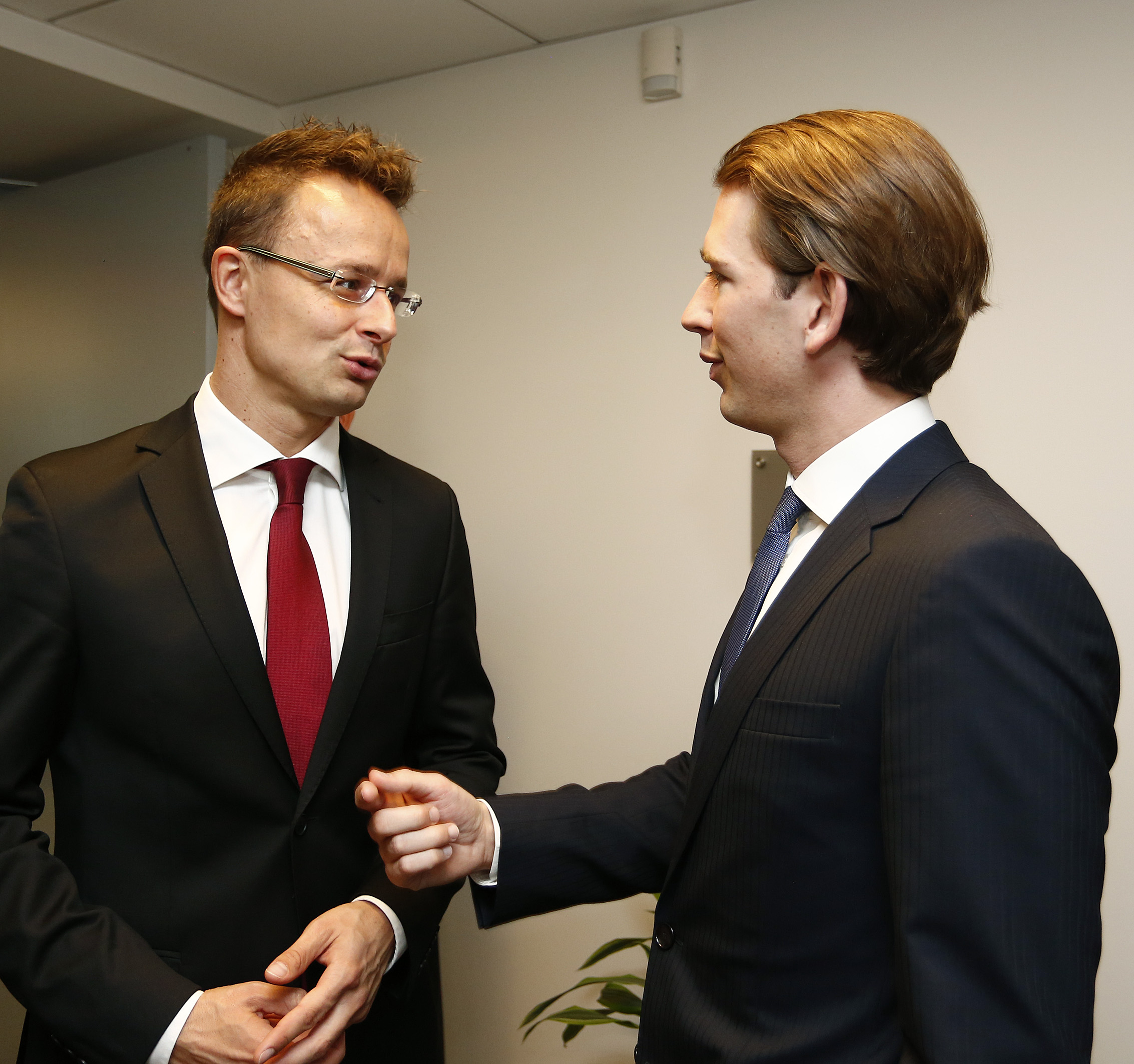 UNO Generalversammlung. EU Außenministertreffen. BM Sebastian Kurz im Gespräch mit dem ungarischen Außenminister. New York, 28.09.2015, Foto: Dragan Tatic